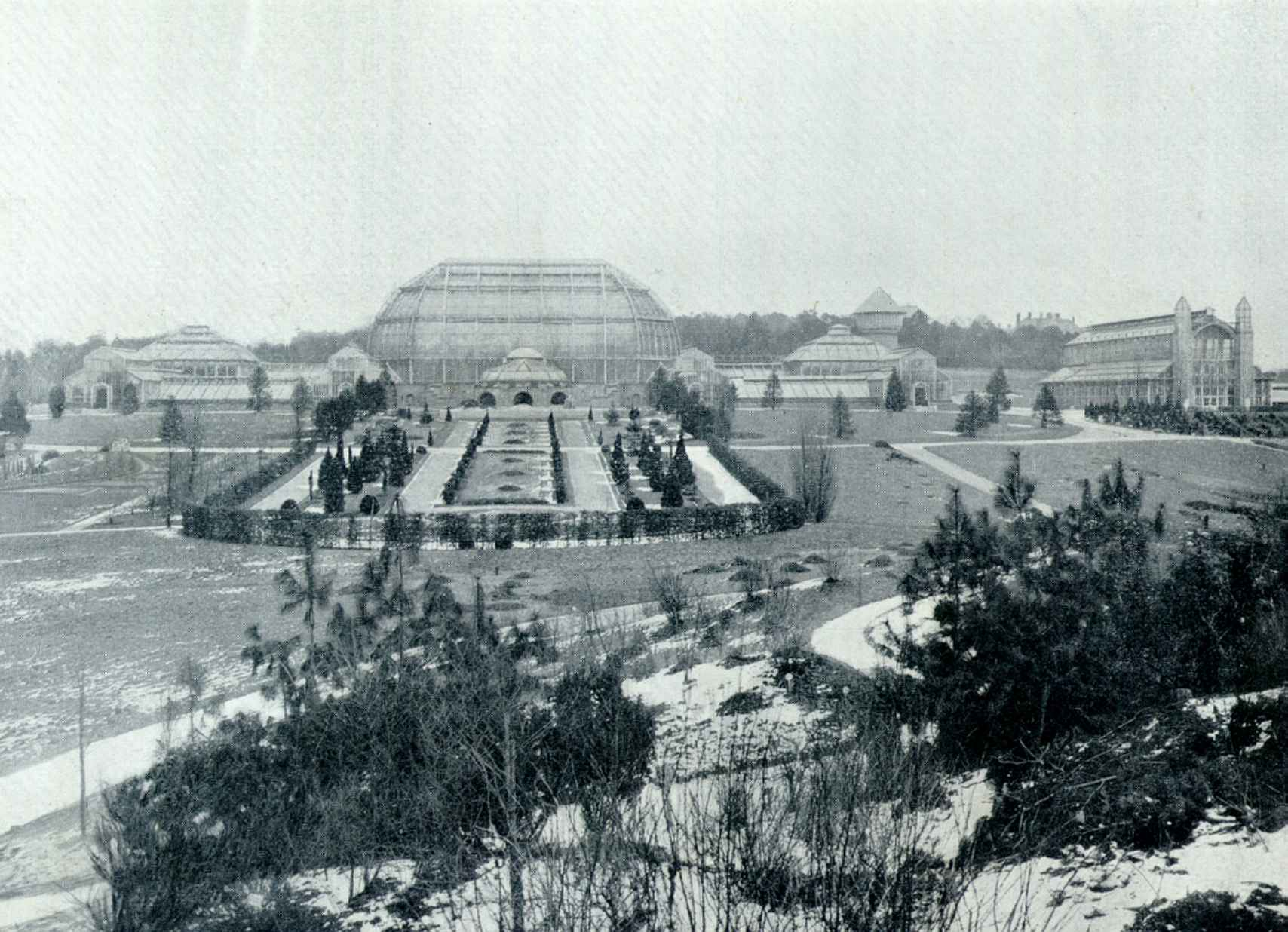 Botanical Garden in Berlin Native nameBotanischer Garten, Berlin-DahlemLocationBerlinCoordinates52° 27′ 18″ N, 13° 18′ 12.96″ E Established1899Website